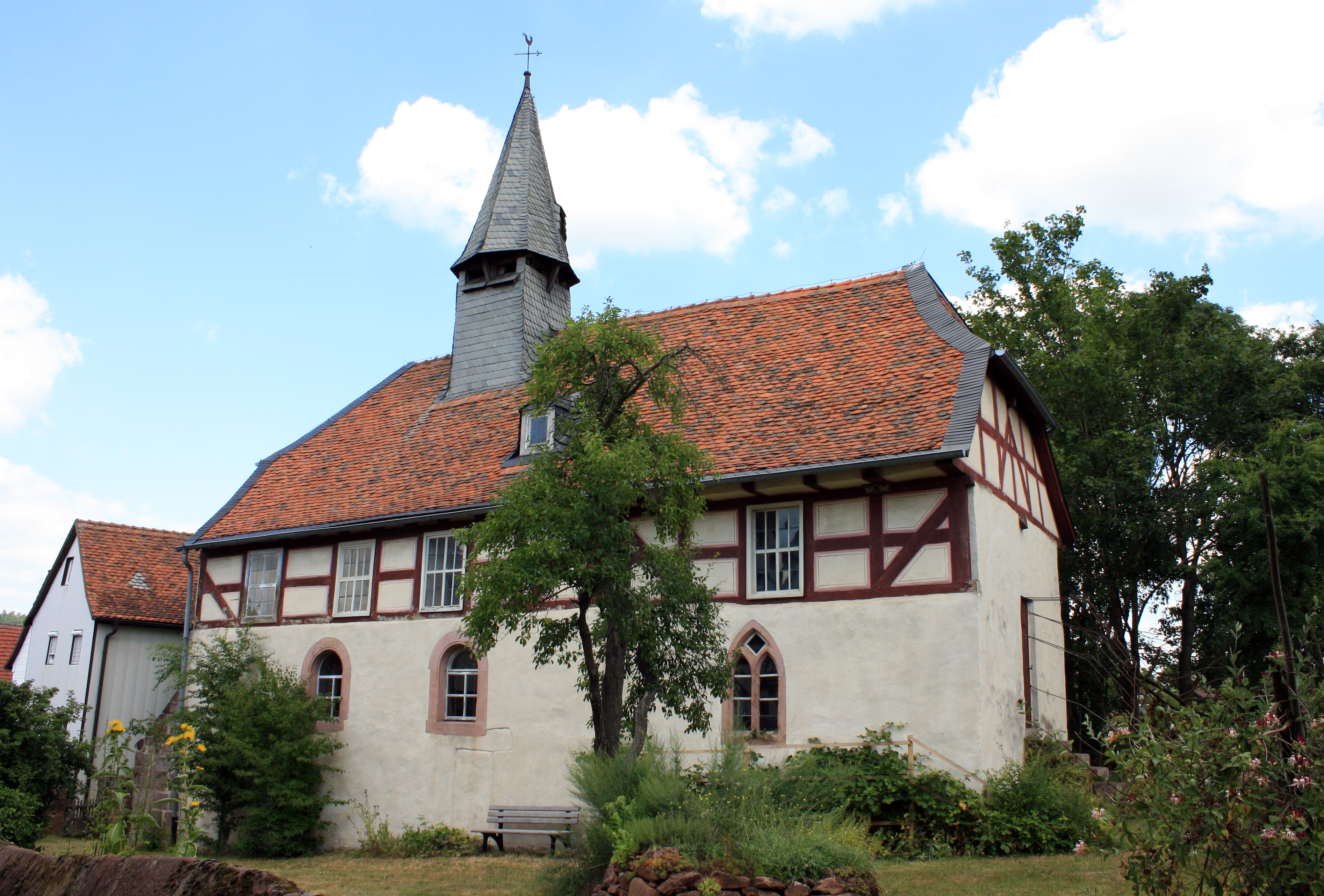 Die alte Kirche in Bürgeln